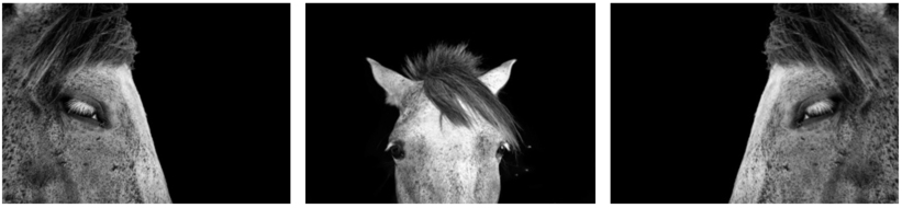 The White Head, Print pe Durst Lambda suport Aluminiu, 2010, 100x70cm